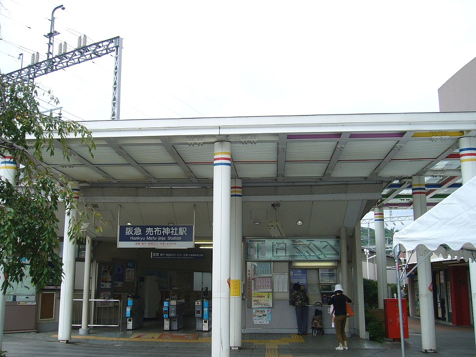 阪急宝塚本線売布神社駅 南口